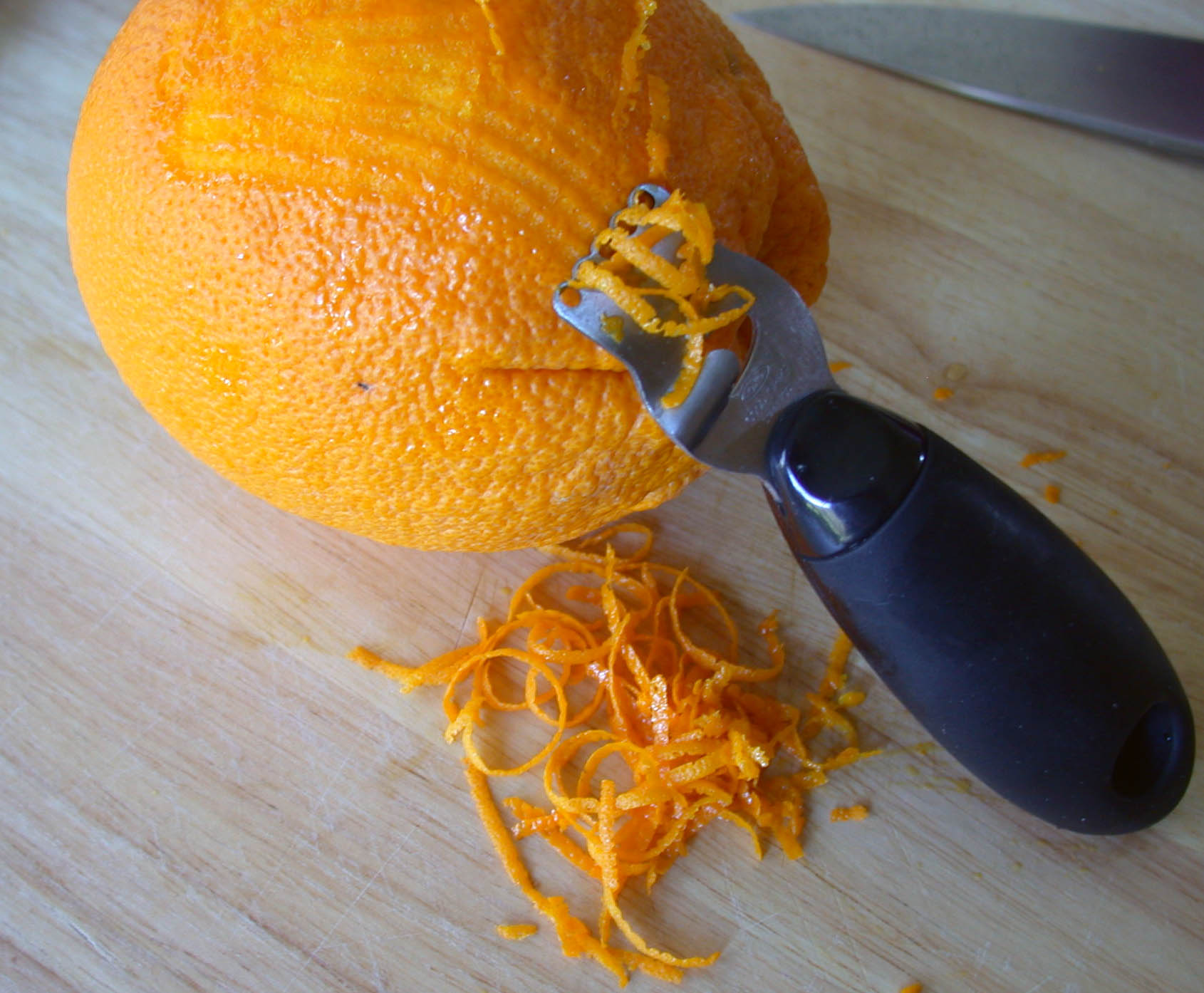 Using an orange zester to zest an orange.